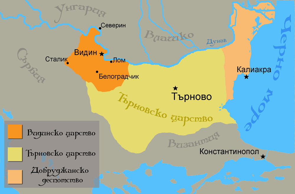 Видинското царство и Балканите в края на 14 век. Template:Картинка инфо